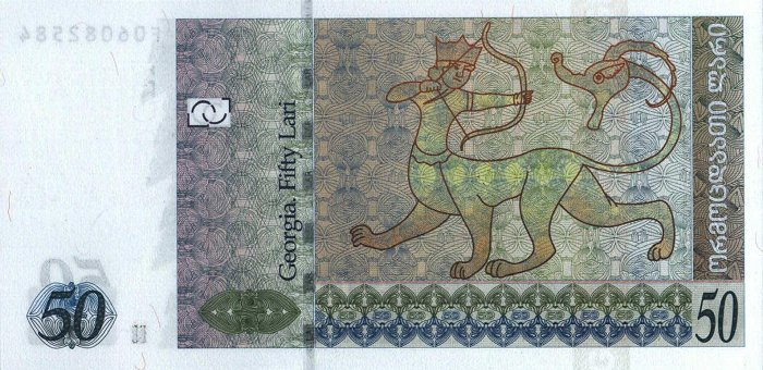 50 lari